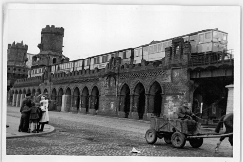 Berlin, Oberbaumbrücke, beschädigt, U-Bahn 5 Jahre nach der Kapitulation in Berlin. UBz: Die Oberbaumbrücke im Osten Berlins. Aufn.: Illus Bödel 3 Leu. 5956-50 27.3.50